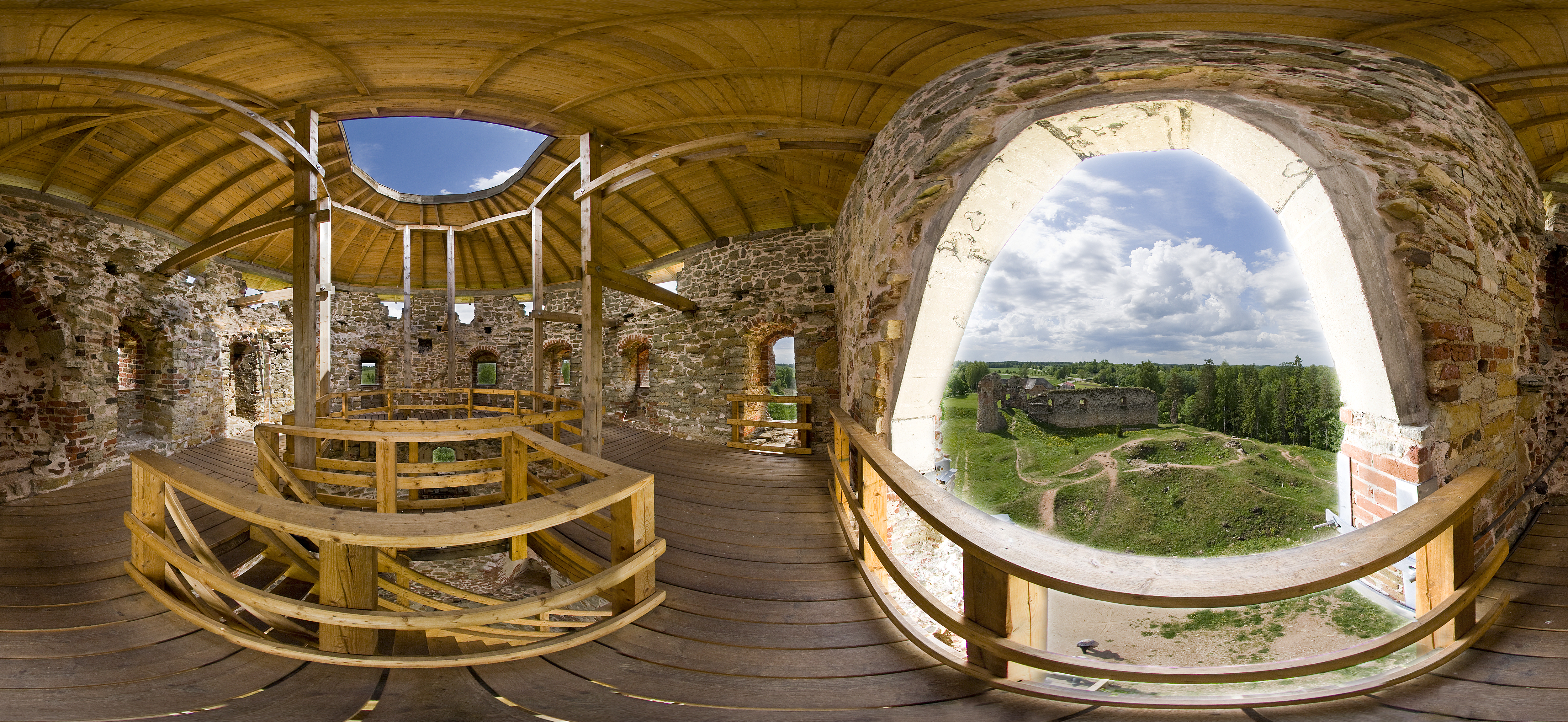 Võru maakond, Vastseliina vald, Vana-Vastseliina küla Vastseliina linnus